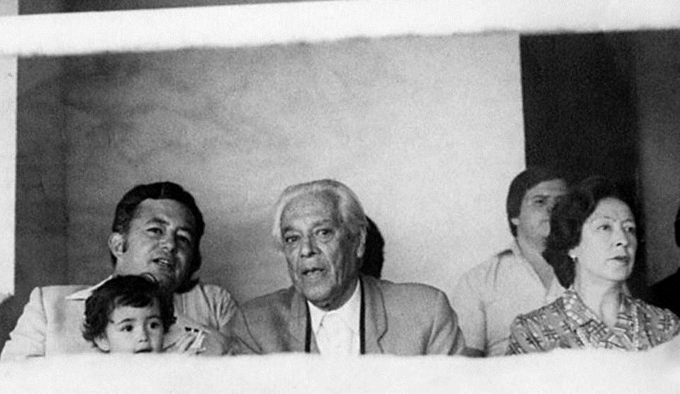 Corrida de toros en la Monumental Plaza México, en 1981. Aparece María Luisa Gaxiola y Dighero, de 2 años de edad, junto con Jaime Gaxiola (su papá), y el poeta Renato Leduc.